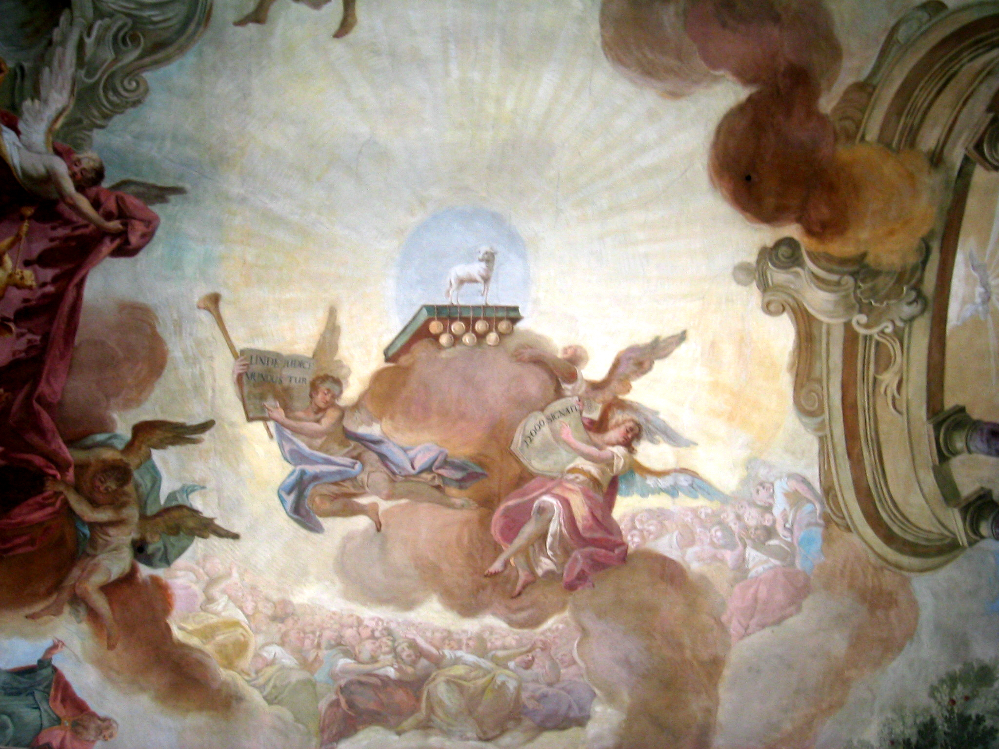 Bad Schussenried, Kloster Schussenried, Bibiothekssaal, Gewölbefresko, Scheitel Mitte, Jüngstes Gericht mit dem Apokalyptischen Lamm